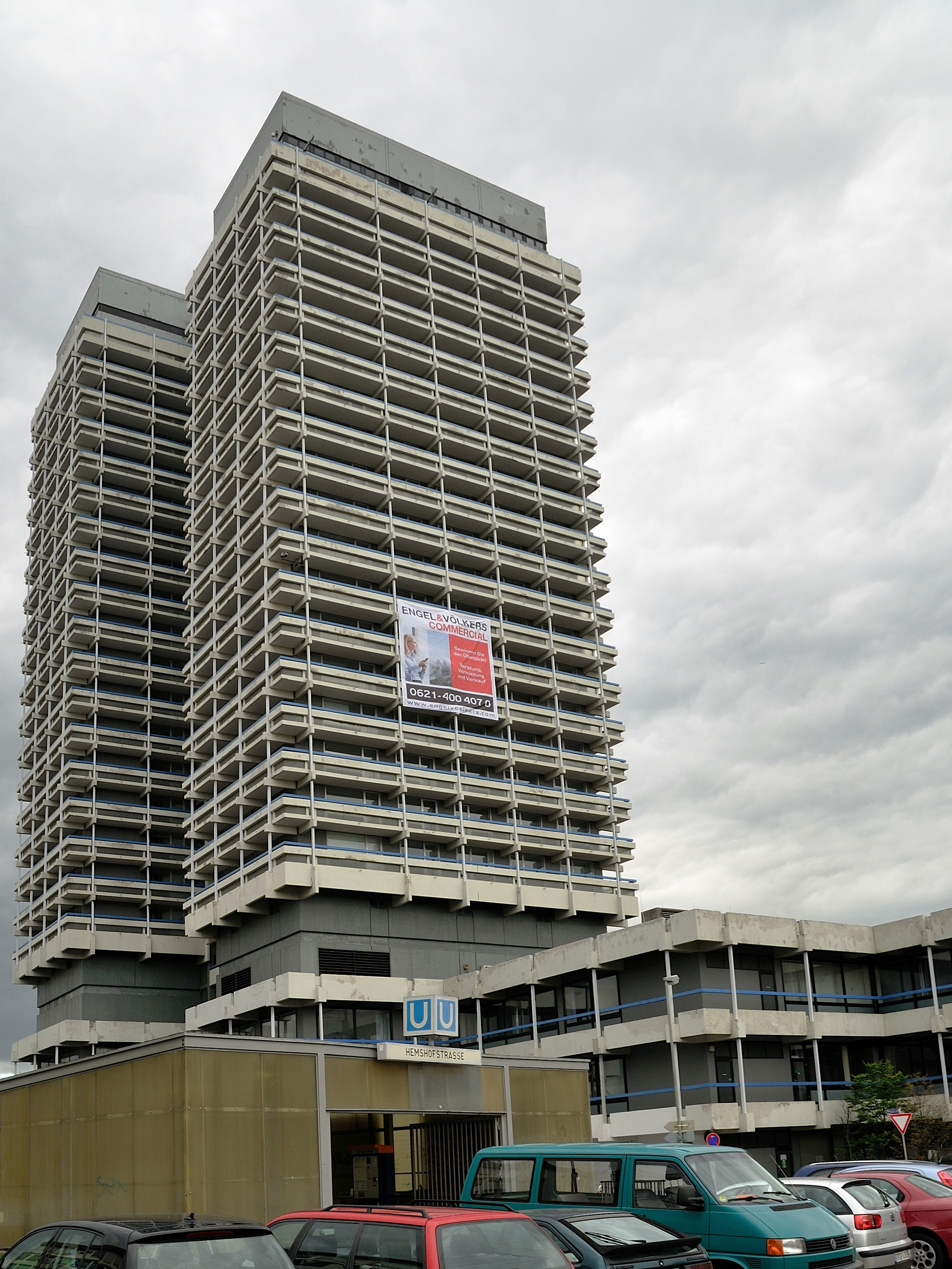 Das leere und zum Verkauf stehende Hemshof-Center-Hochhaus in Ludwigshafen.